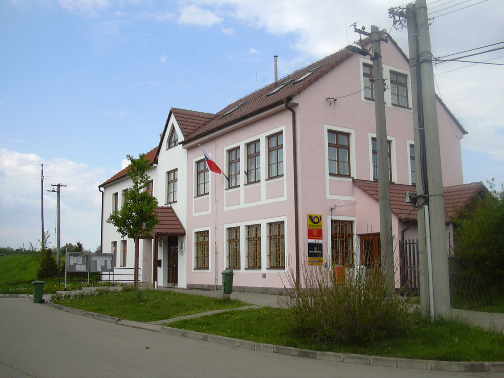 obecní úřad Hoštice-Heroltice (Vyškov- Czech republic)